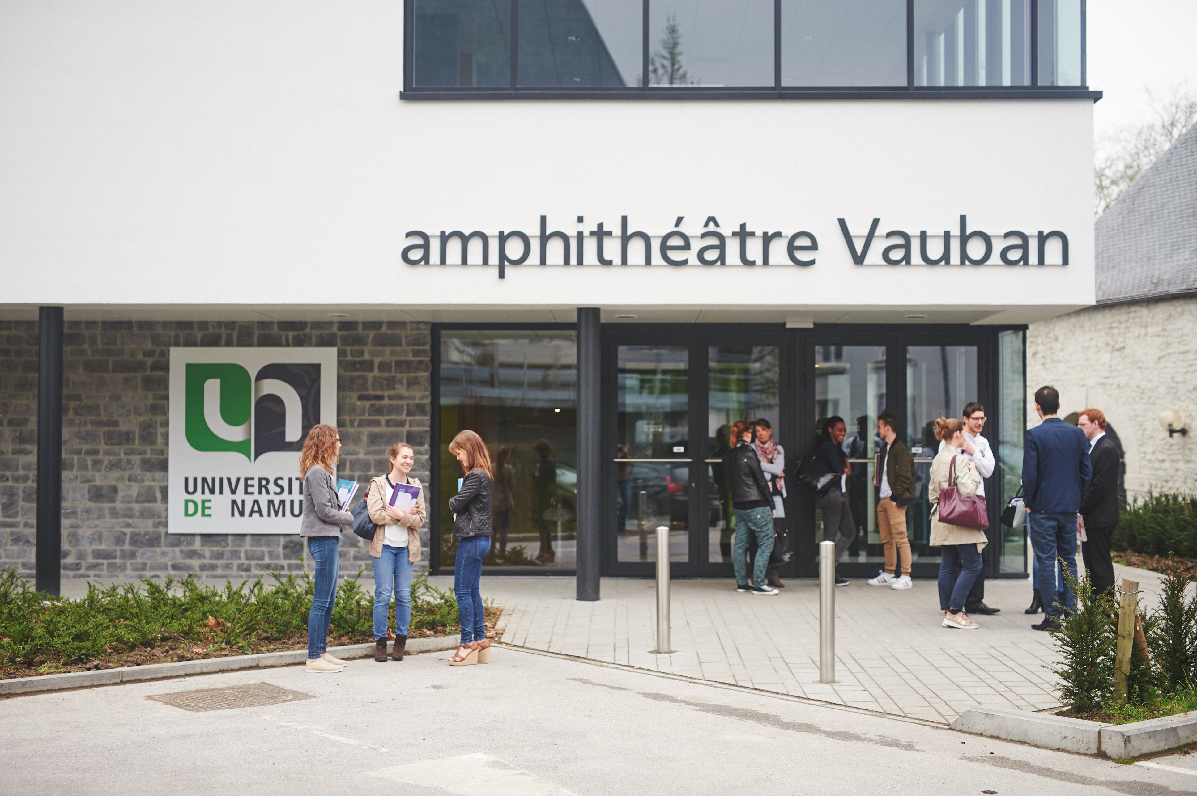 Amphithéâtre Vauban - Boulevard frère Orban - Namur